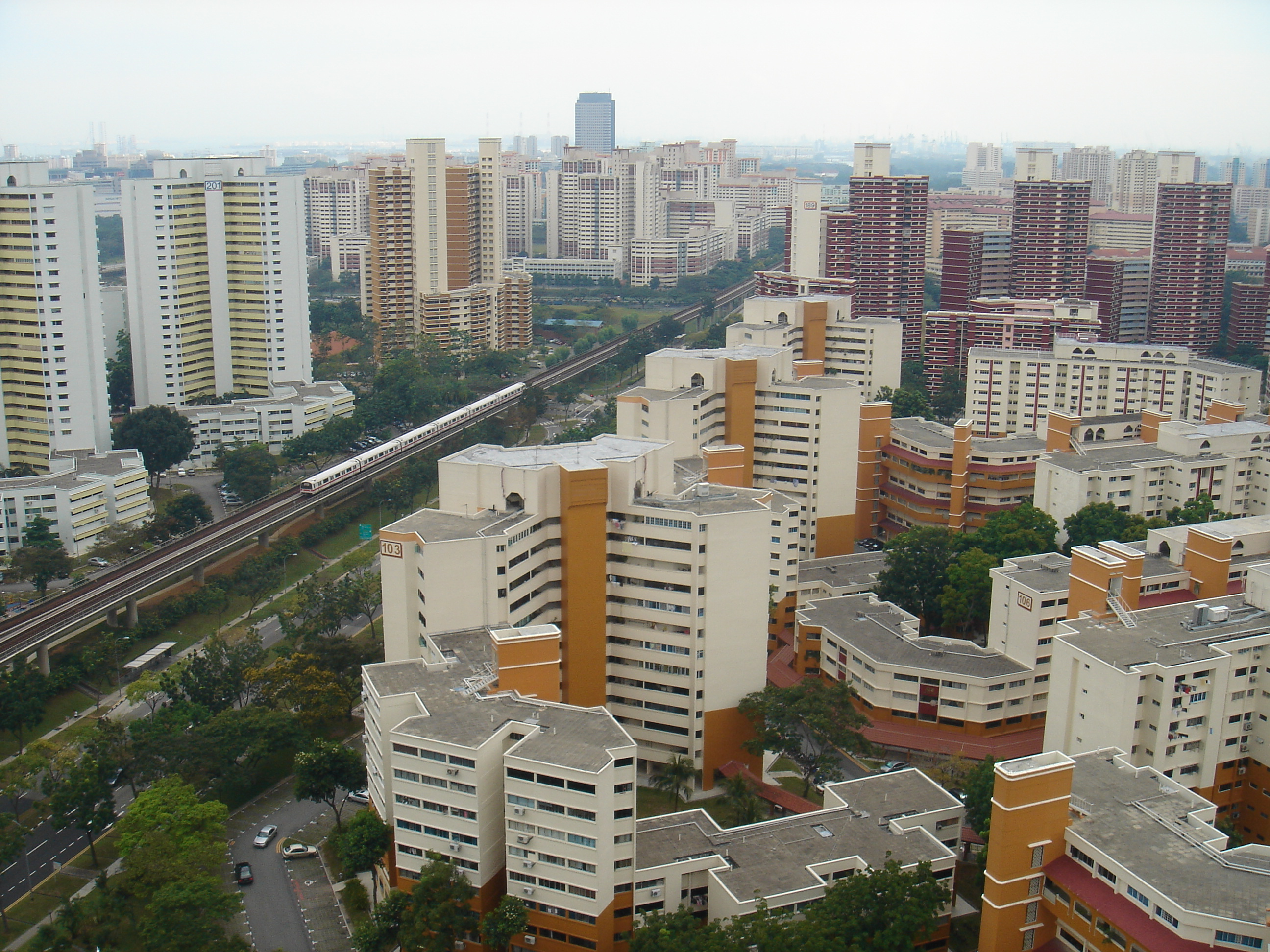 Top view of Bukit Batok, Singapore.